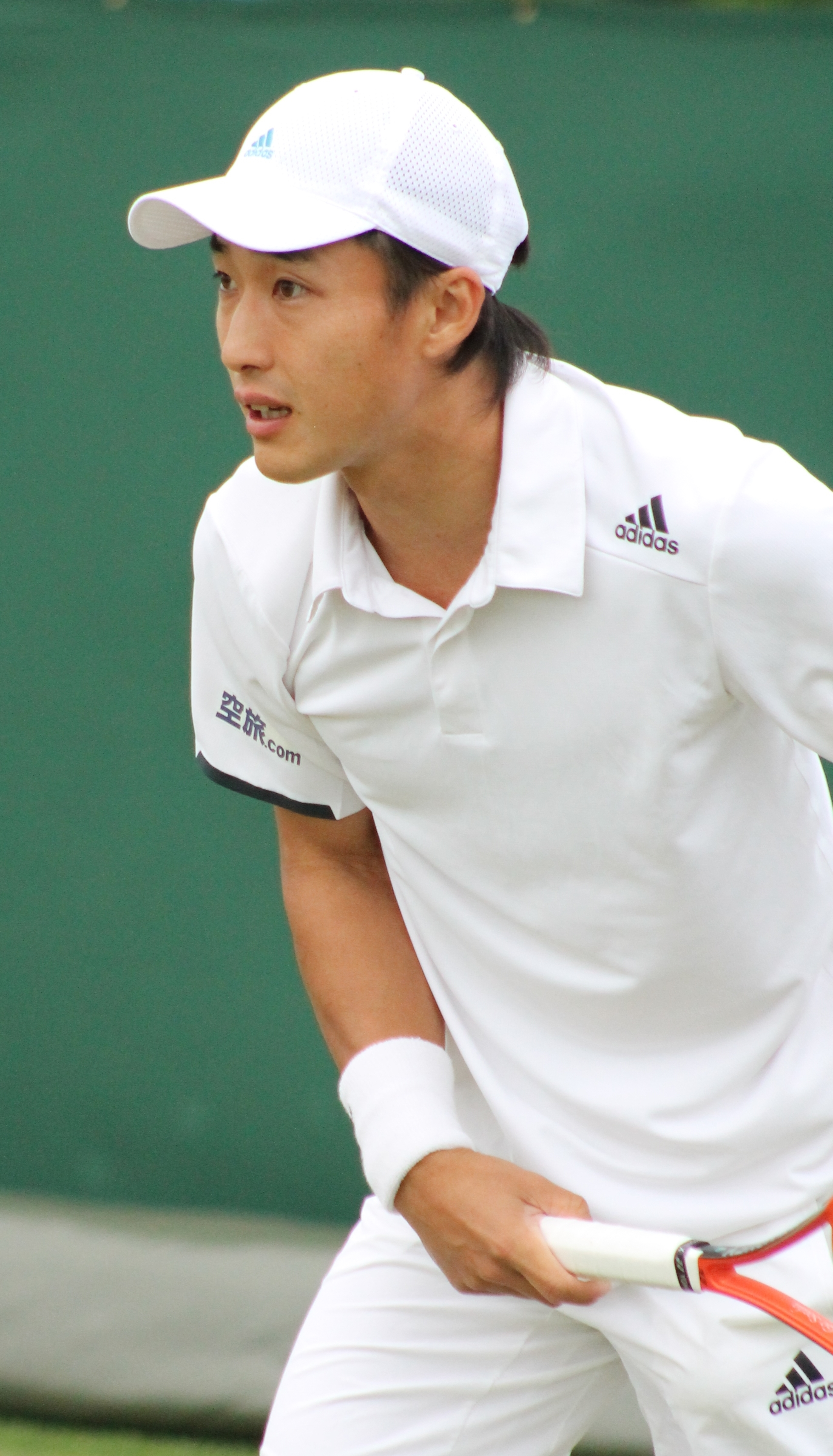 Soeda WMQ14 (17)